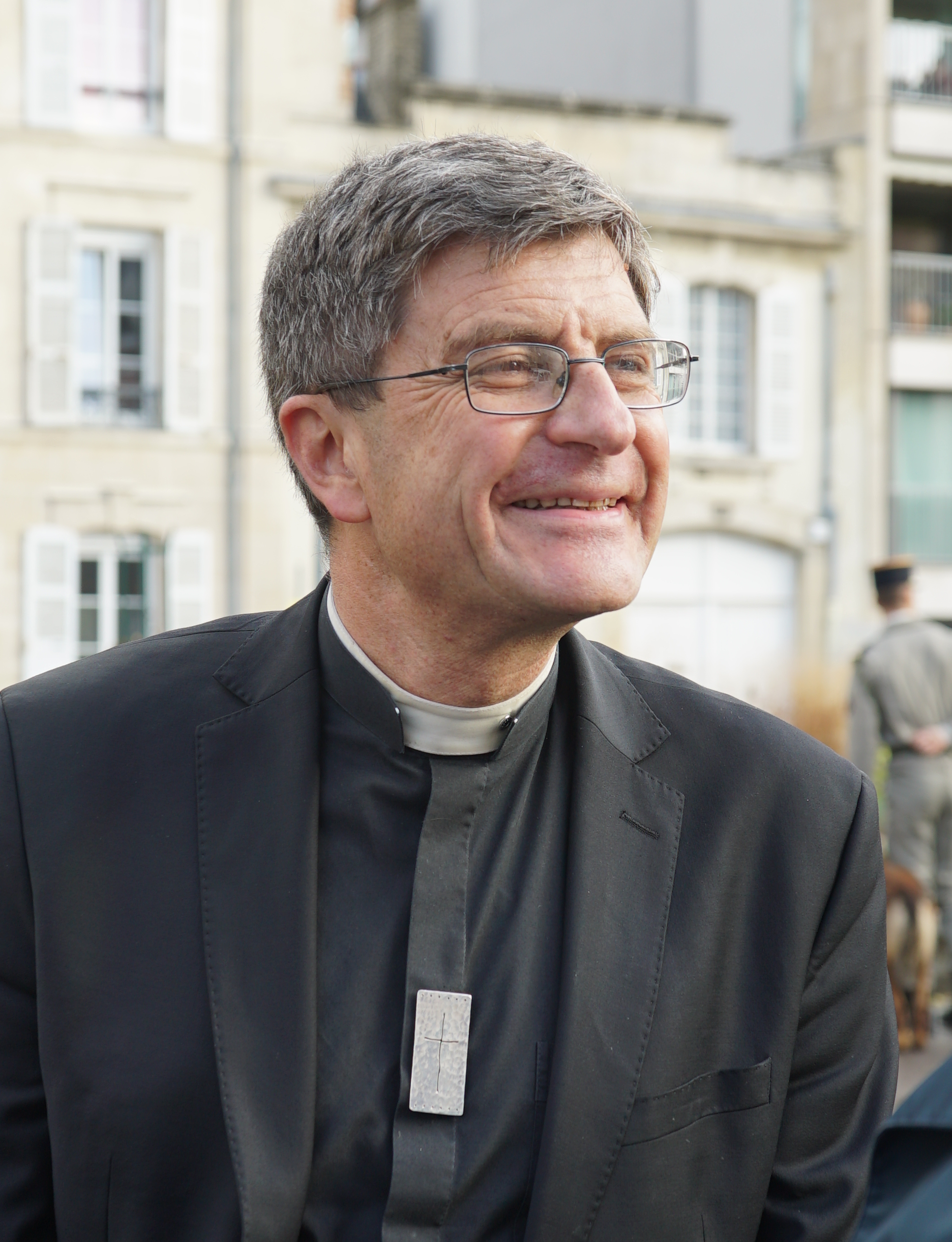 lors des commémorations du 11 novembre 2018 à Reims.